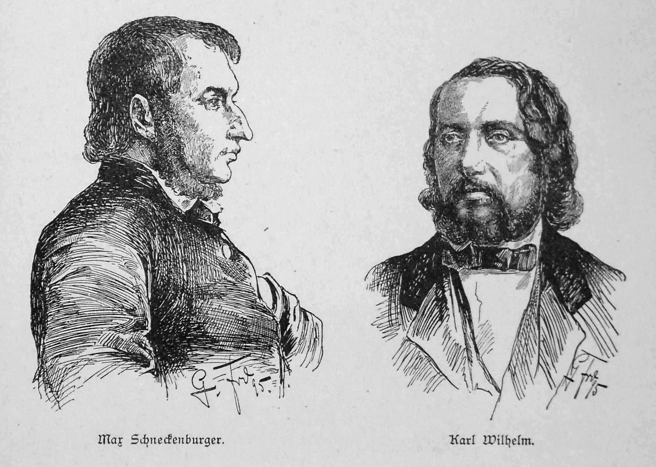 Max Schneckenburger, Karl Wilhelm